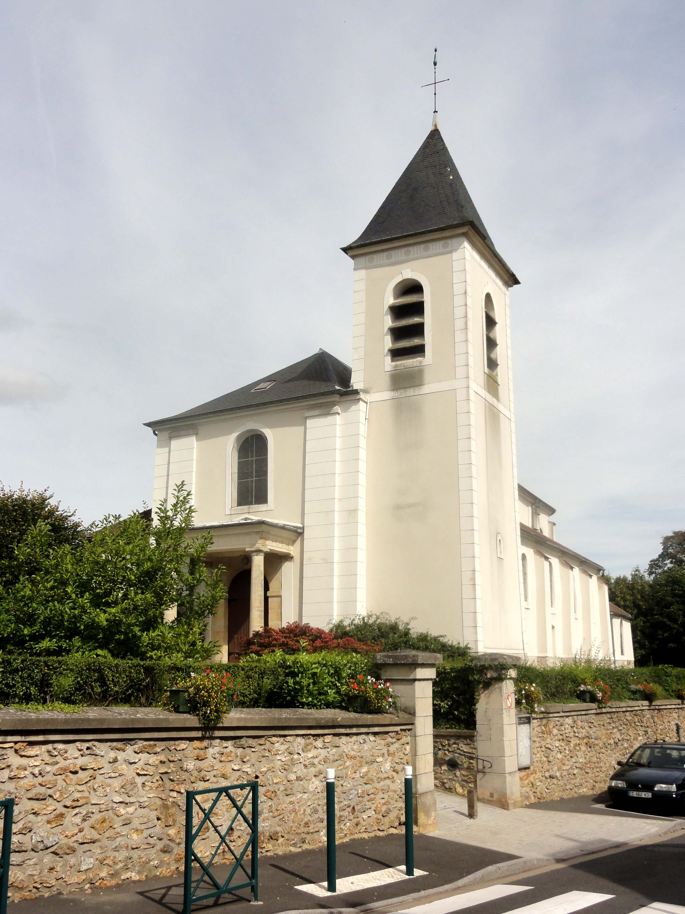 Eglise Saint-Martin, vue depuis l'ouest.